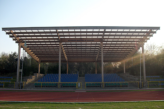 Olecko